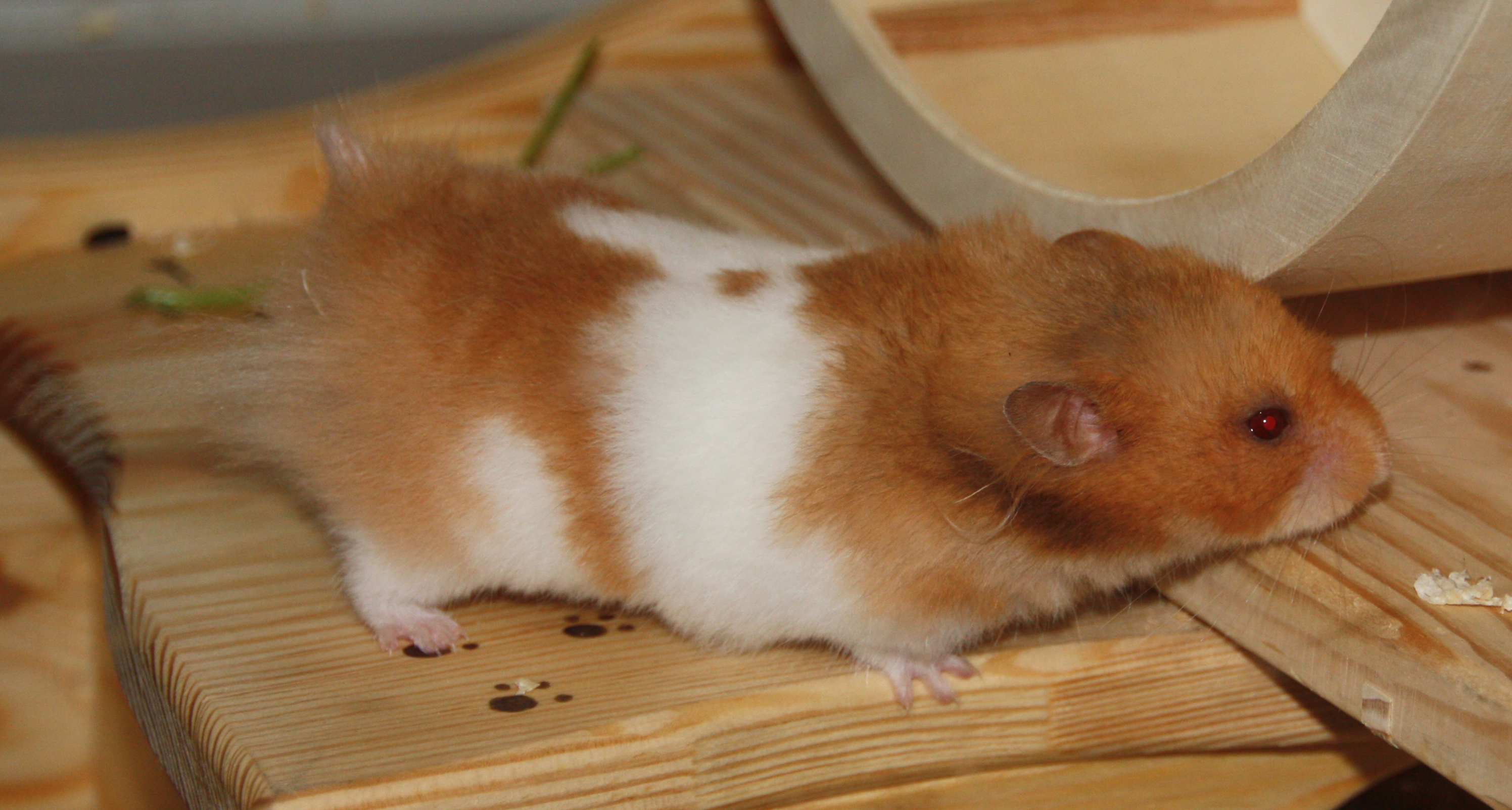 Deckstarre einer Teddyhamsterdame